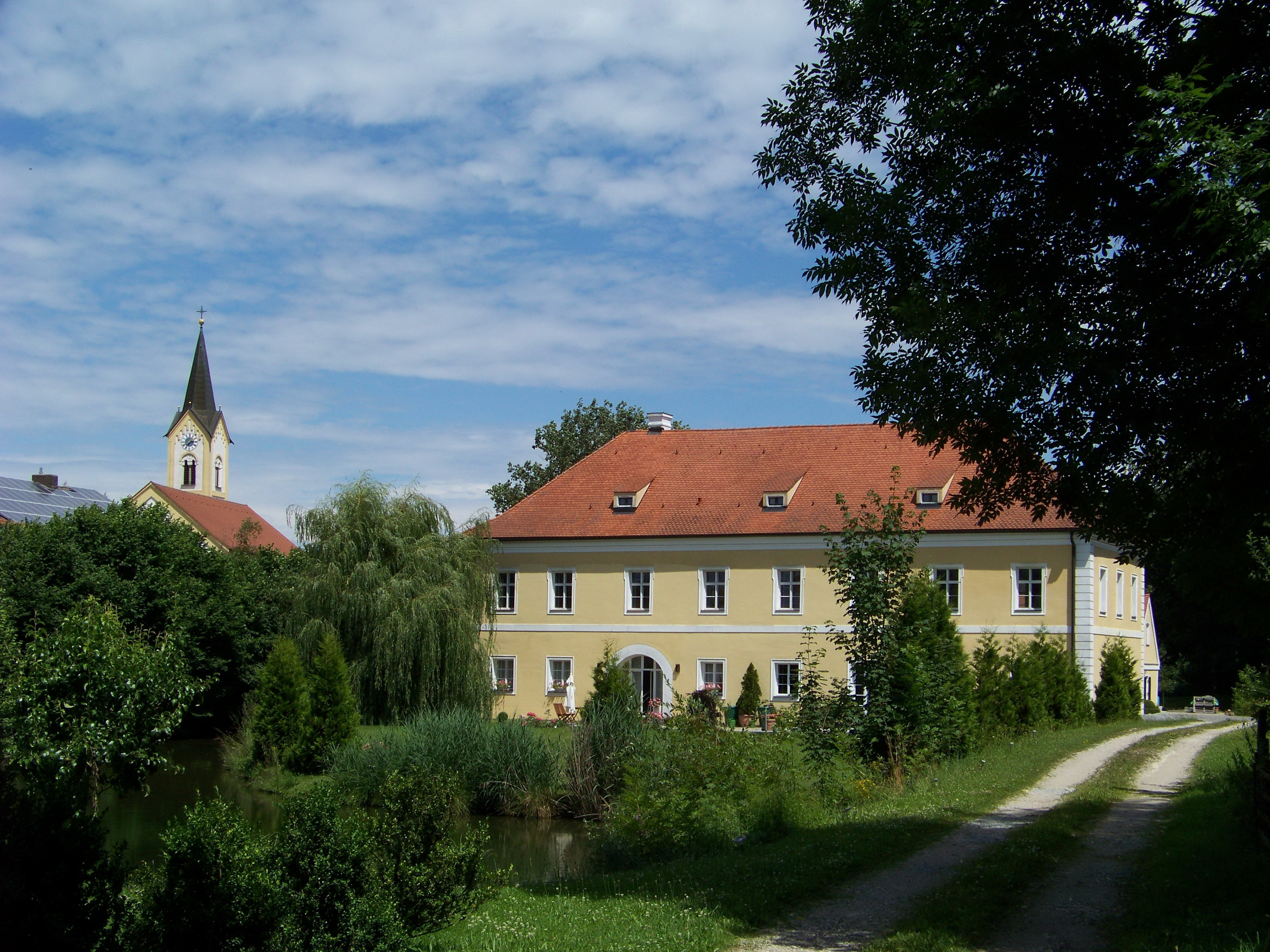 Mallersdorf-Pfaffenberg. Oberhaselbach 504. Ehem. Schloss, Weiheranlage zu zwei Flügeln, wohl 17. Jahrhundert, 1756 umgebaut; zugehörige Sommerkeller, südöstlich des Schlosses.